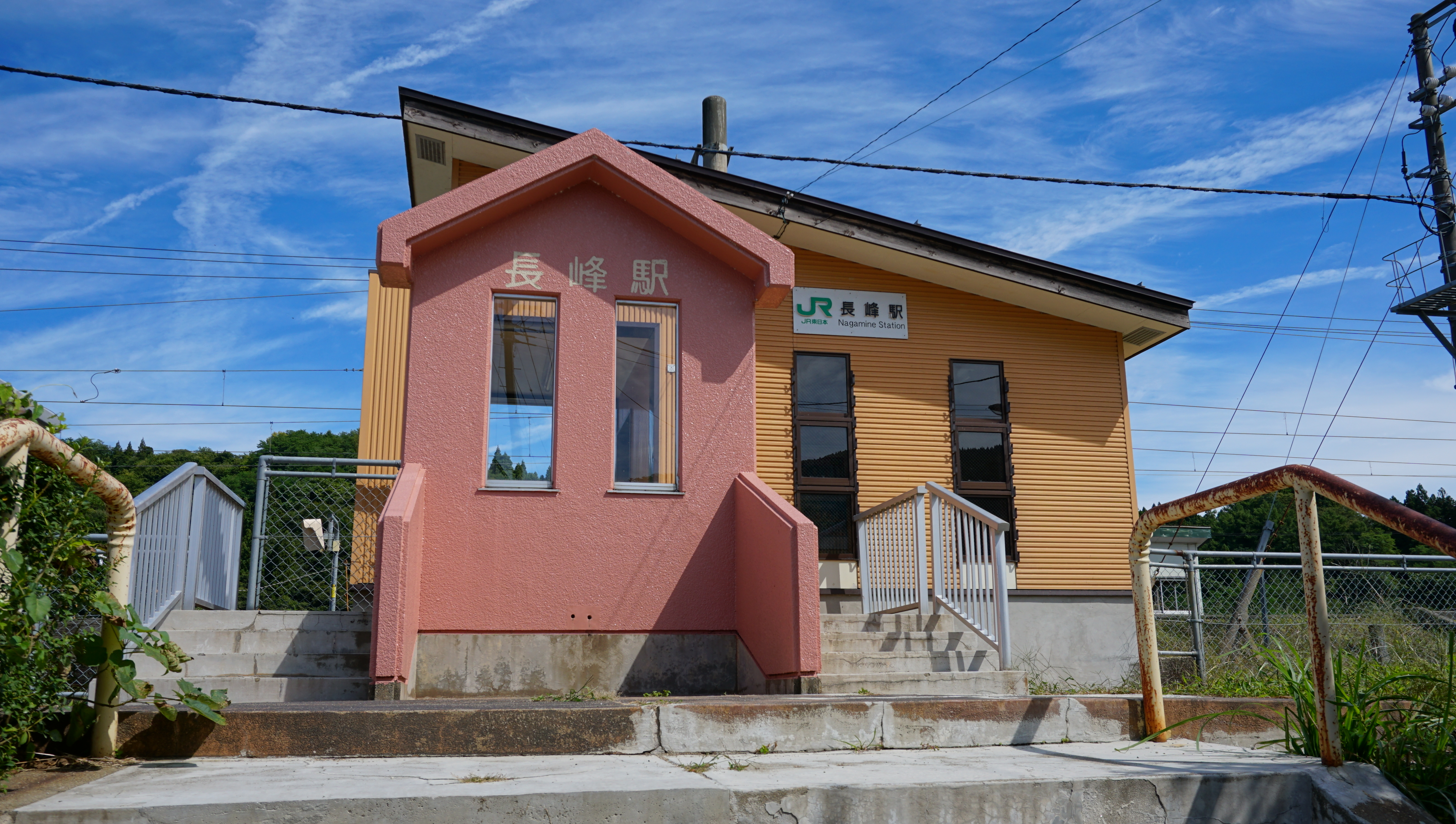 奥羽本線 長峰駅（青森県南津軽郡大鰐町）